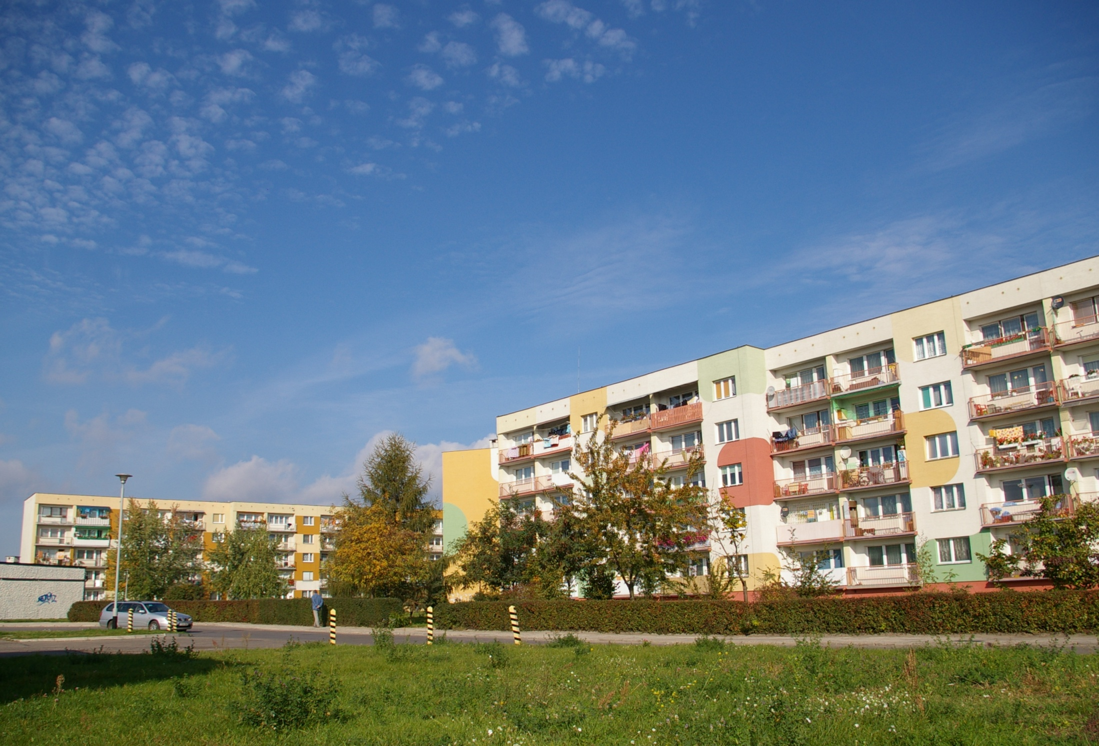 Bloki na osiedlu Stawki w Ostrowcu Świętokrzyskim